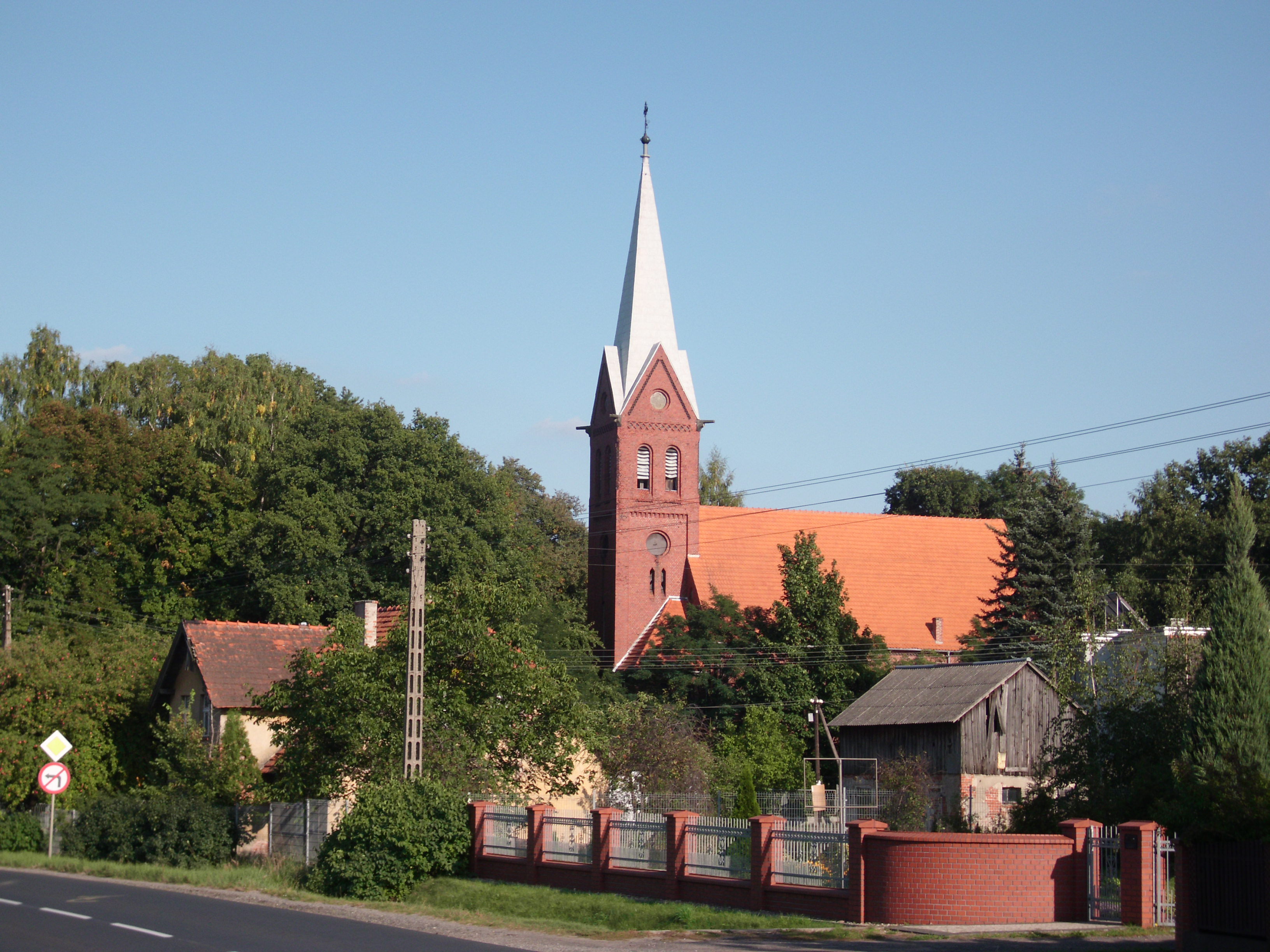 Kobyla Góra - kościół ewangelicki (widok boczny z drogi)